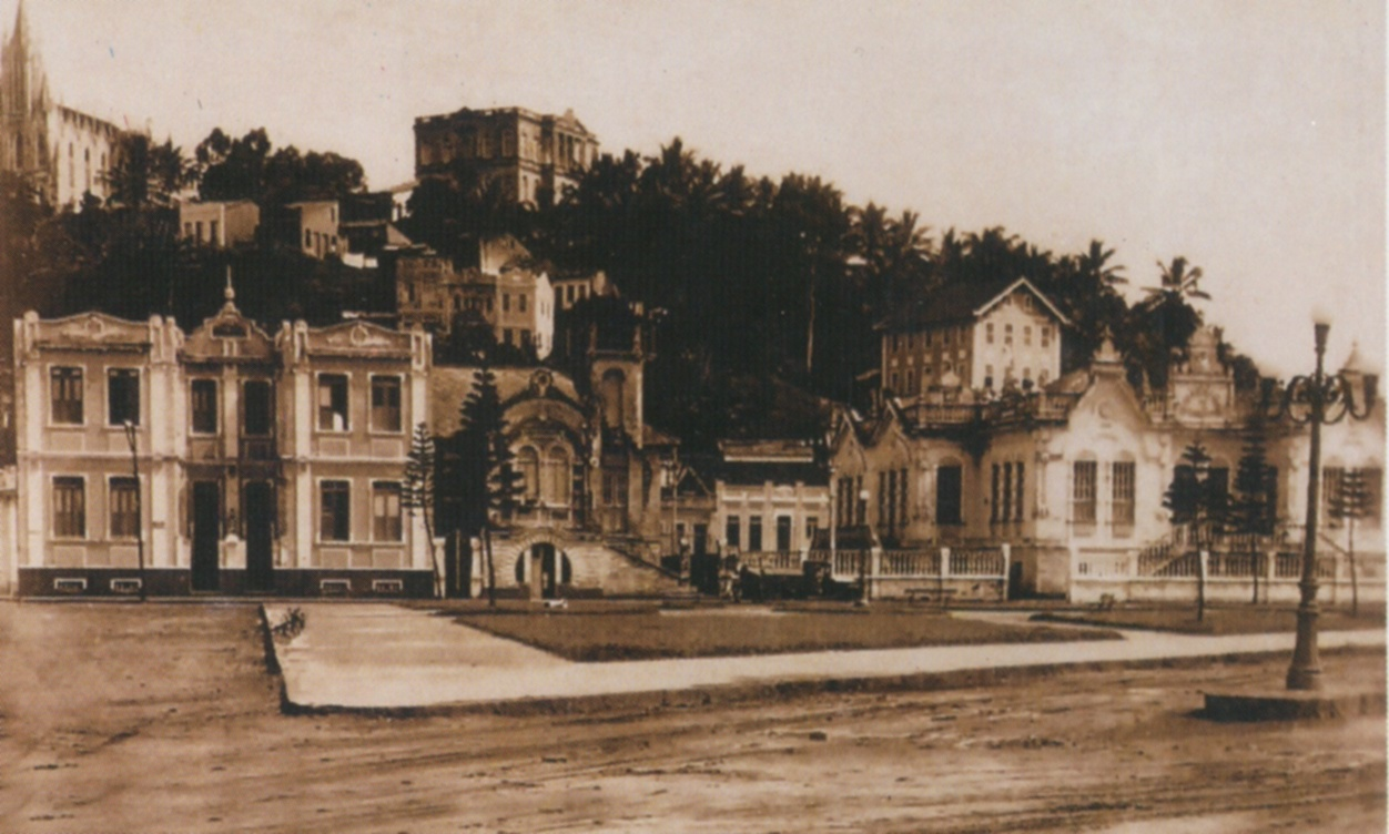 Praça Rui Barbosa, Ilhéus, Bahia, Brasil